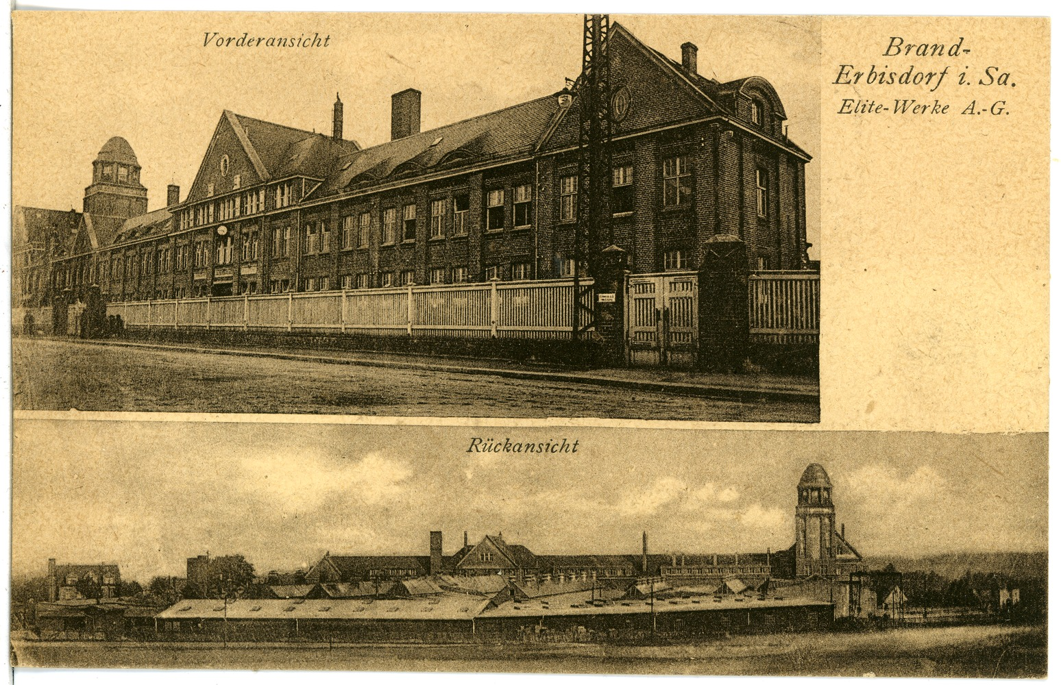 Brand-Erbisdorf; Elite Werke This postcard is from publisher Brück & Sohn in Meißen ( postcard has a unique number 21729 and is available in a higher resolution at the publisher. This images was uploaded in a cooperation project between Wikipedians and the publisher.